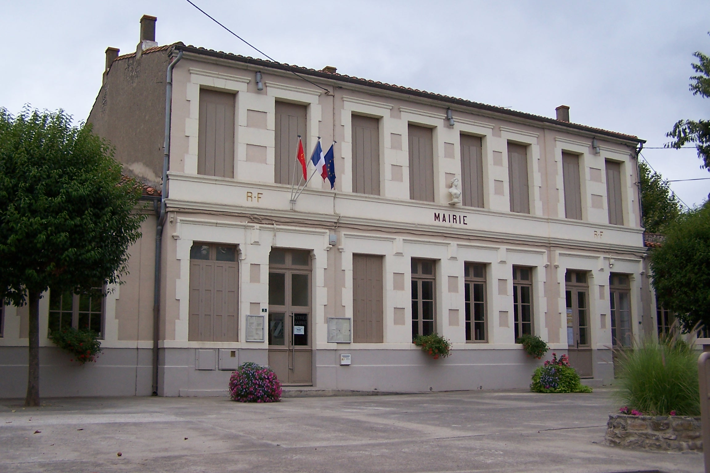 Mairie de Aigues-Vives (Aude)